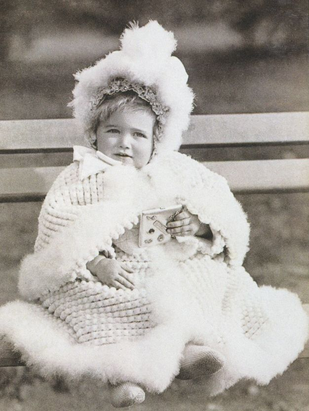 Maria Nikolaevna Romanova, circa 1900